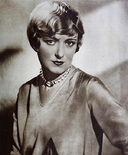 Kathryn McGuire